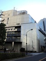 日本消防設備安全センター本所が置かれている日本消防会館